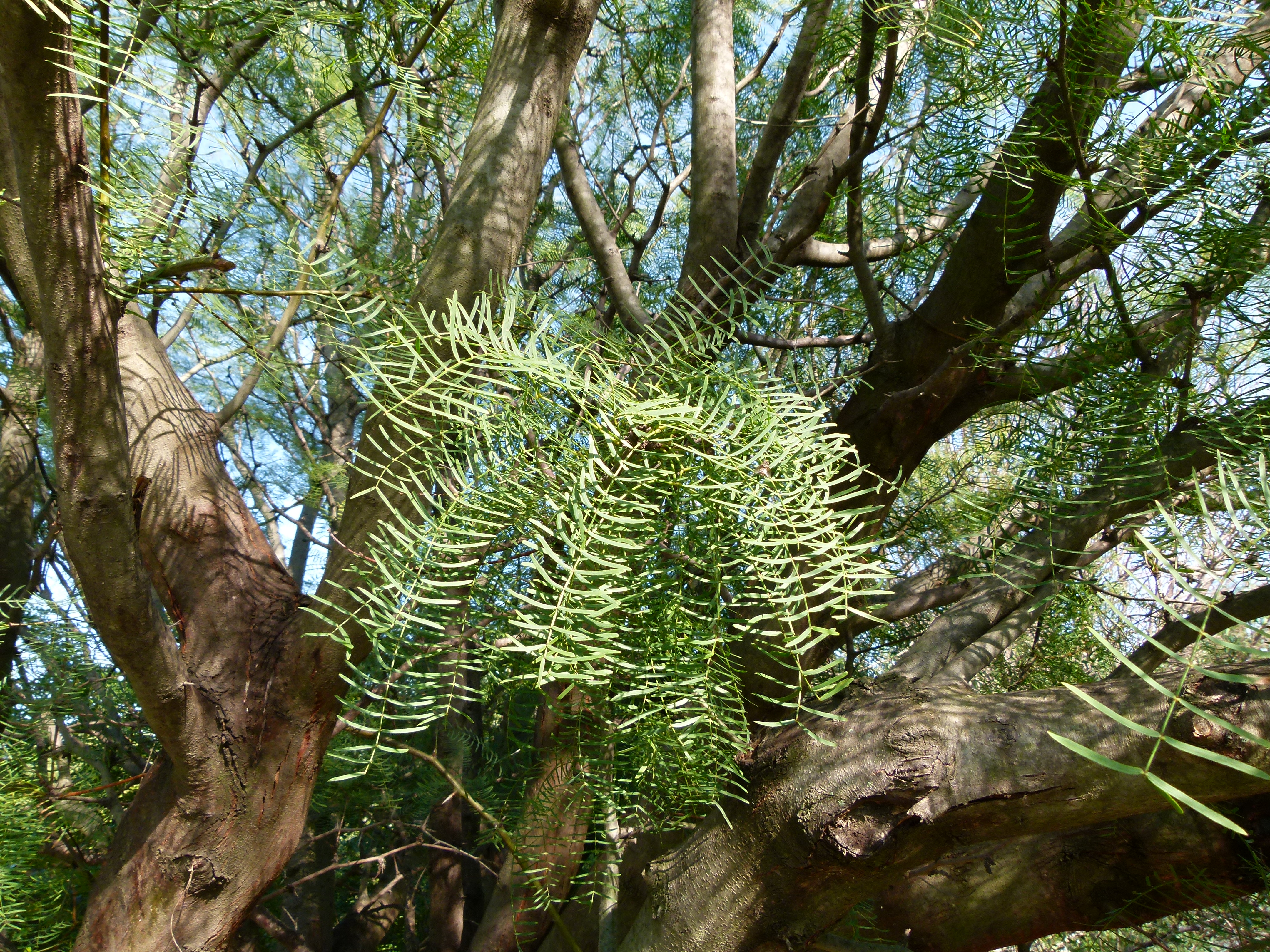 Jardin botanique Barcelone